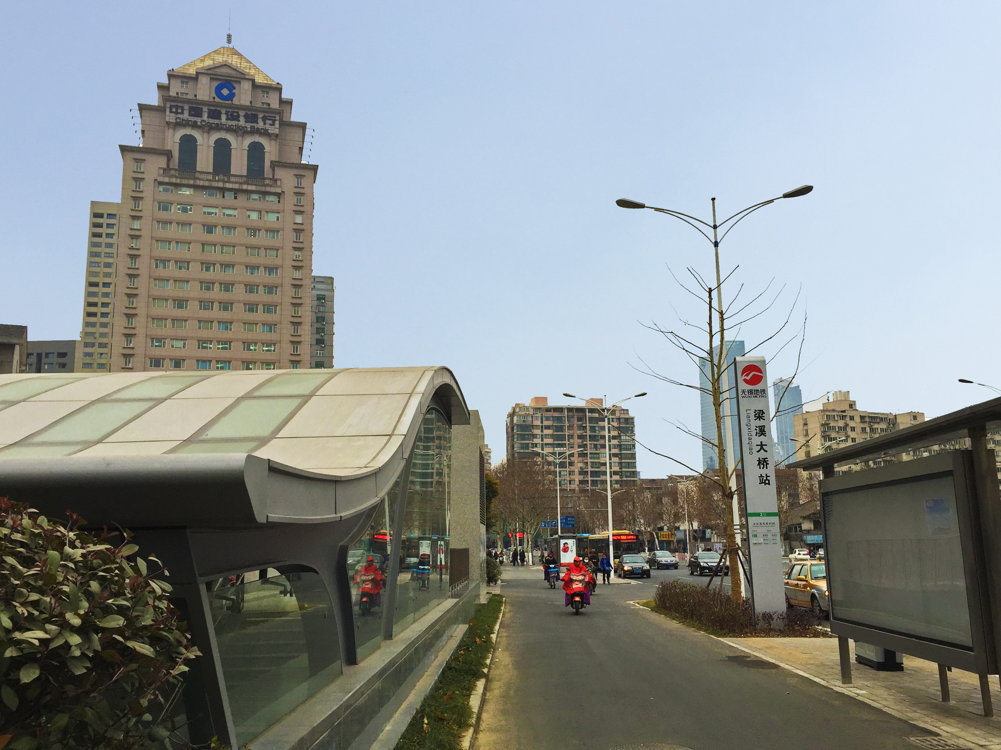 无锡地铁2号口梁溪大桥站3号口附近